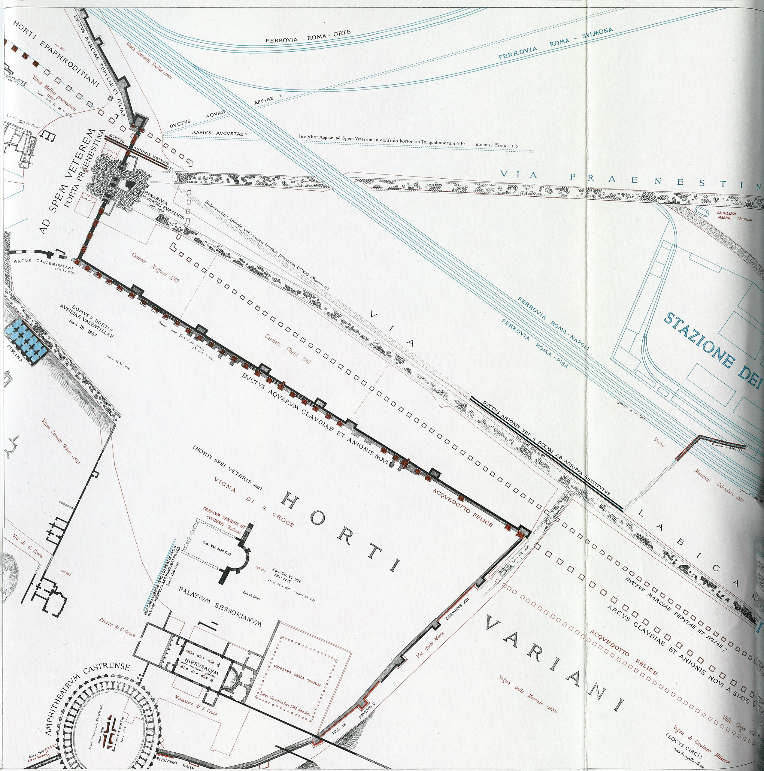 da Rodolfo Lanciani, Forma Urbis Romae, Regio V, Horti ad Spem Vetrem. Elaborazione da [1] + [2]